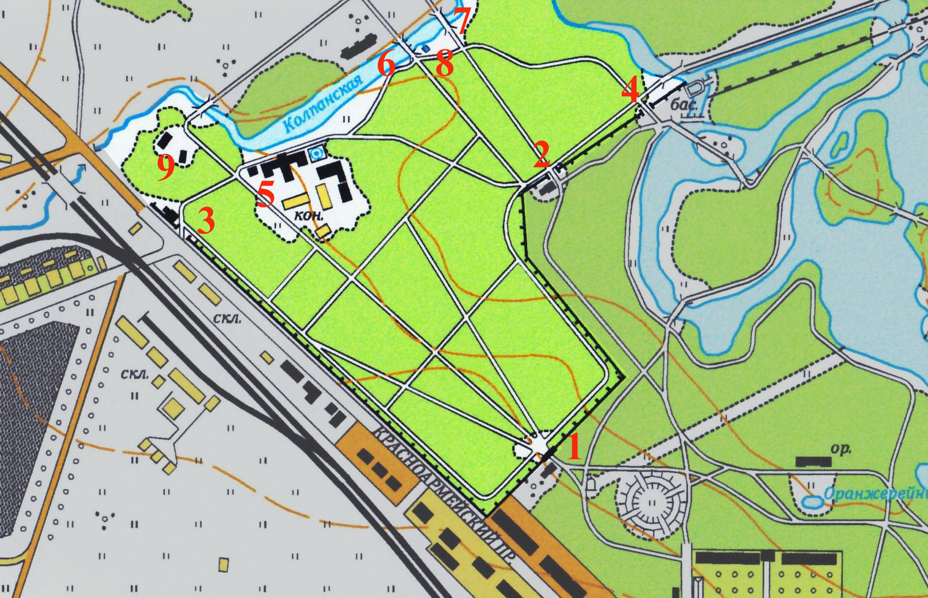 Вырезка с топографического плана 1:10 000, участок территории с парком Сильвия; состояние местности на 1939 г. Элемент плана города Красногвардейск (состояние местности 1939 года) в программе AutoCAD 2005 на экране монитора компьютера. Вынужден вставить этот снимок по следующему вопросу. Некоторые «сильно бдительные» участники не могут себе представить, что человек, занимающийся разработкой топографических документов и сам выполняющий сверку на местности, а также, последующую распечатку на принтере своего компьютера, может выставить своё произведение в качестве иллюстрации для статьи «Википедии». Вот и предоставляю доказательство того, что и среди топографов есть люди, интересующиеся историей родных мест и увлекающиеся такими «экскурсиями в прошлое». А то удалят с заявлениями о «нарушении авторских прав» на данный топографический план.